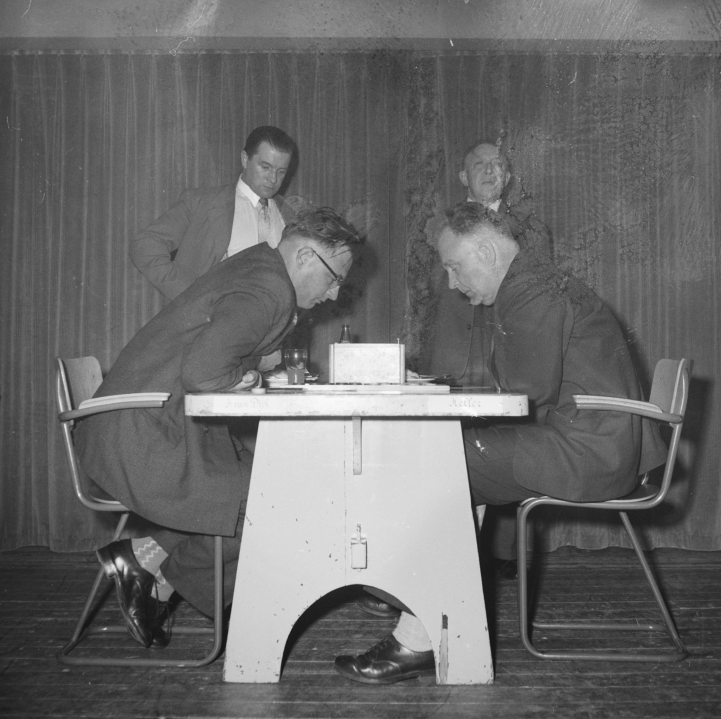 Collectie / Archief : Fotocollectie Anefo Reportage / Serie : [ onbekend ] Beschrijving : Persoonlijk damkampioenschap Nederland. Tweekamp Keller tegen Van Dijk Datum : 3 april 1958 Locatie : Nederland Trefwoorden : Tweekamp, damkampioenschappen Fotograaf : Lindeboom, Henk / Anefo Auteursrechthebbende : Nationaal Archief Materiaalsoort : Negatief (zwart/wit) Nummer archiefinventaris : bekijk toegang 2.24.01.03 Bestanddeelnummer : 909-4632